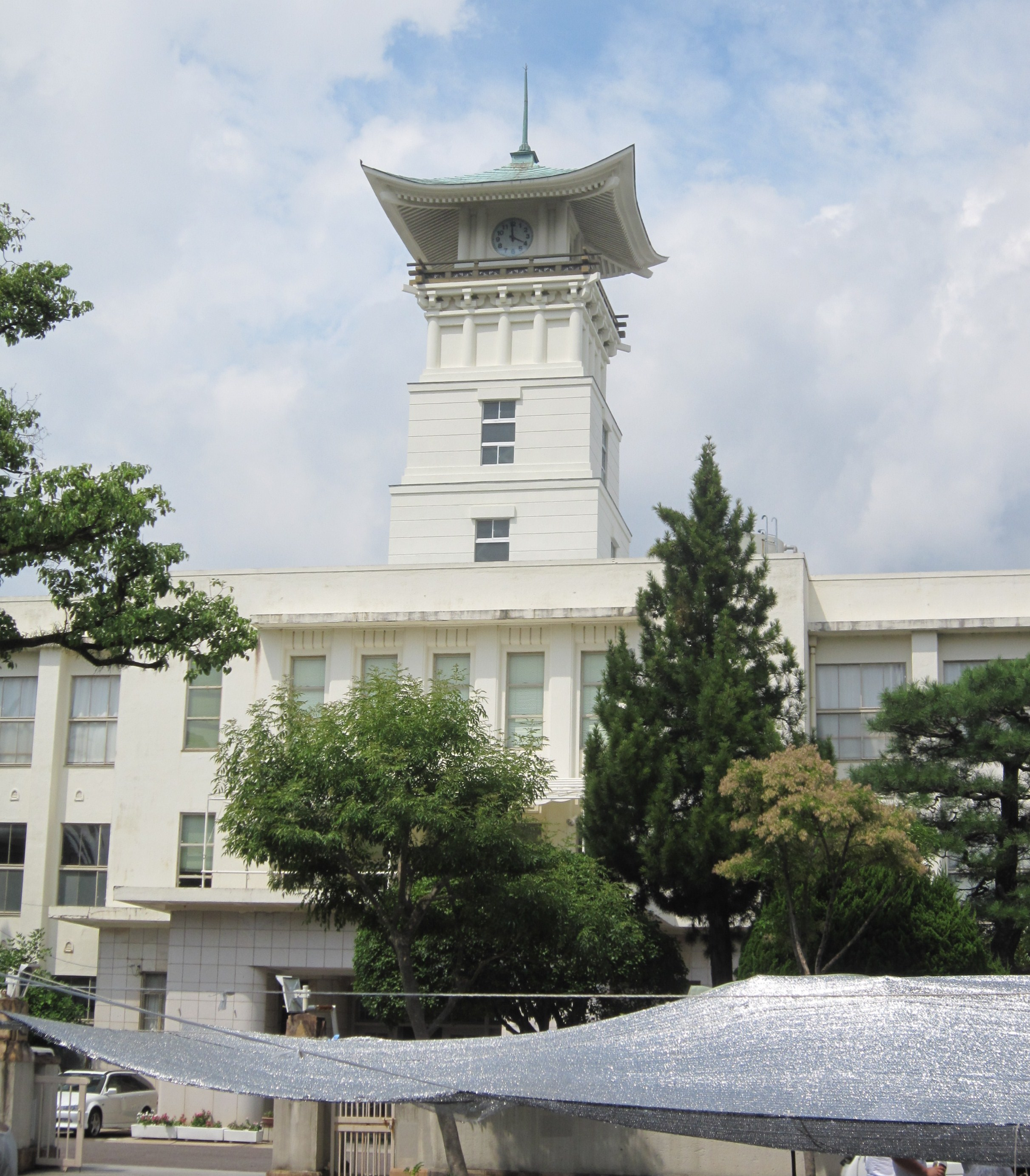 追手前高等学校（外観）